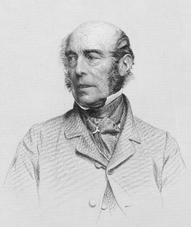 Ulick De Burgh